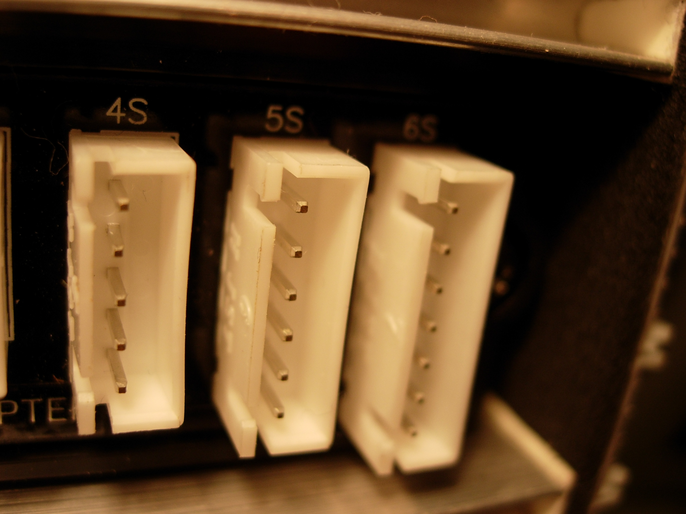 Fotografie der Balancer Buchse vom Typ 'XH' an einem Adapter in für LiPo Akkus mit vier, fünf oder sechs Zellen (4s, 5s & 6s)